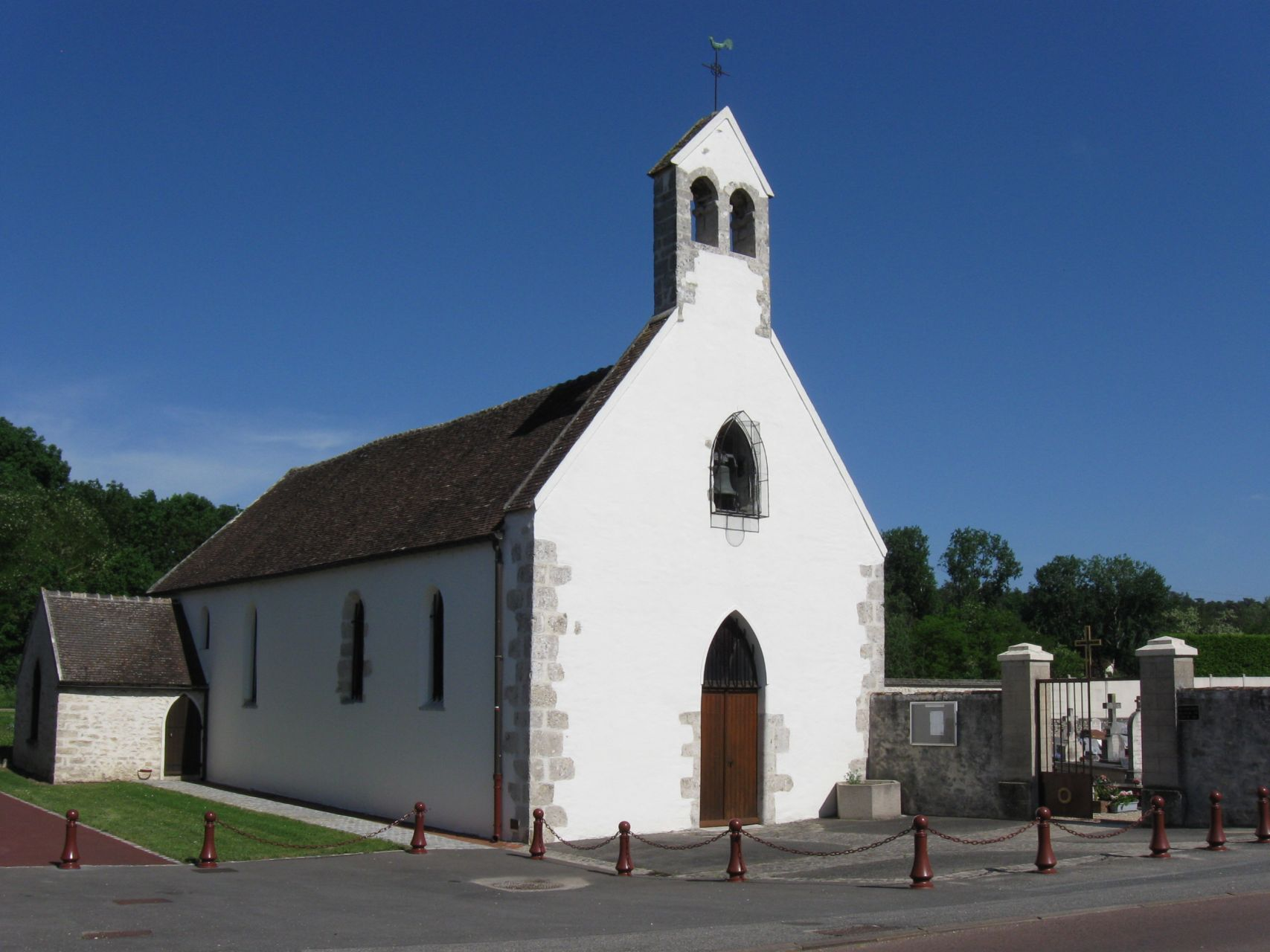 Église Saint-Léonard de Bagneaux-sur-Loing (Seine-et-Marne, région Île-de-France)